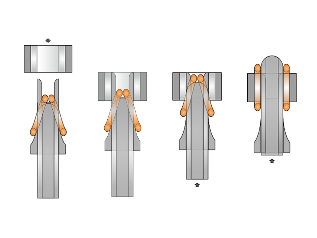 Arbeitsschritte Einziehtechnik: 1) Unbestücktes Einziehwerkzeug; 2) mit Spulen bestücktes Einziehwerkzeug; 3) Einziehwerkzeug mit Spulen und aufgesetztem Stator; 4) in Stator eingezogene Spulen